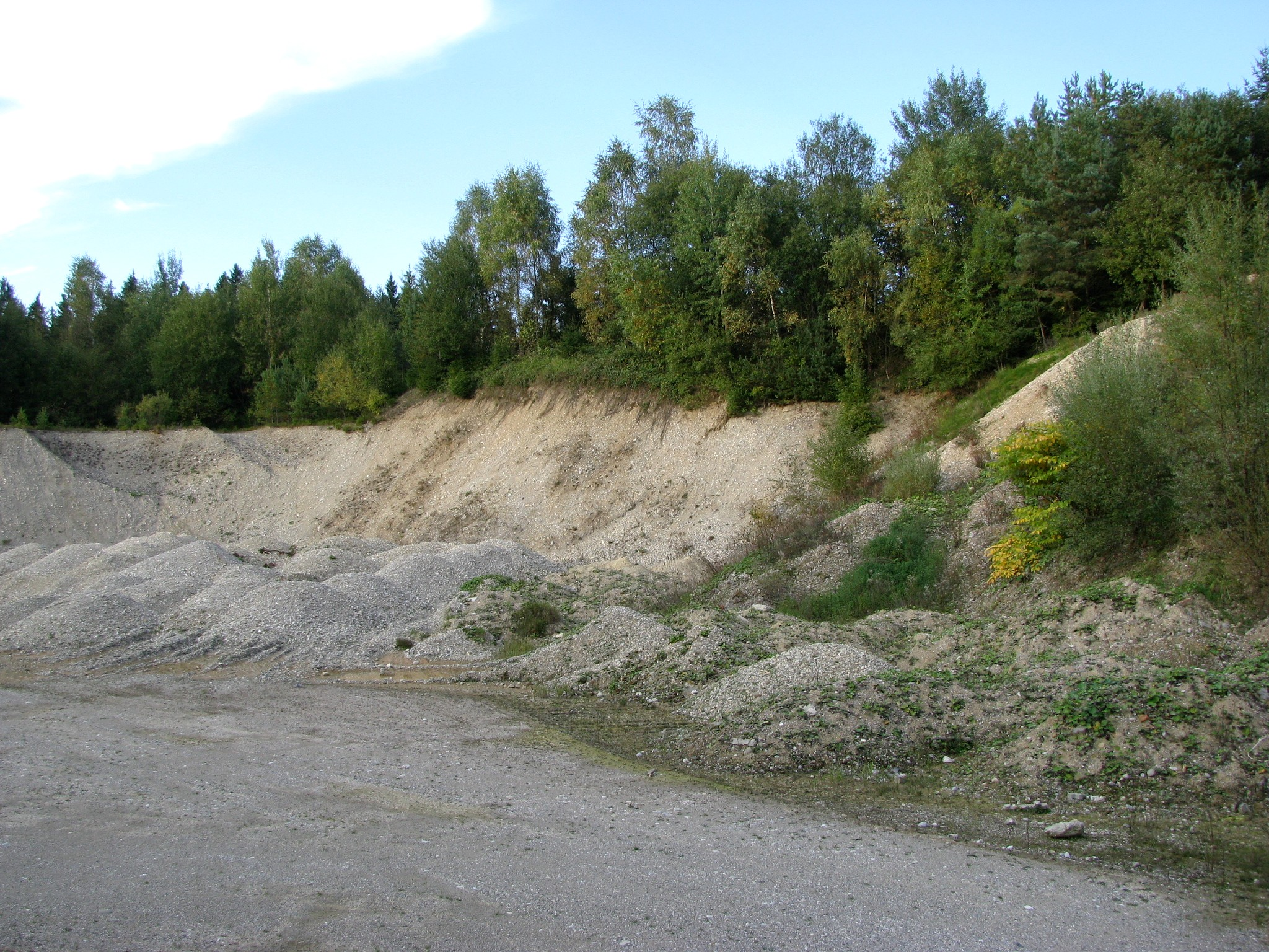 Kiesgrube am Friederikengeräumt im Forstenrieder Park